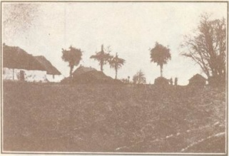 Стрілецькі могили у Вівсю з фотольбому Українські Січові Стрільці, 1914–1920